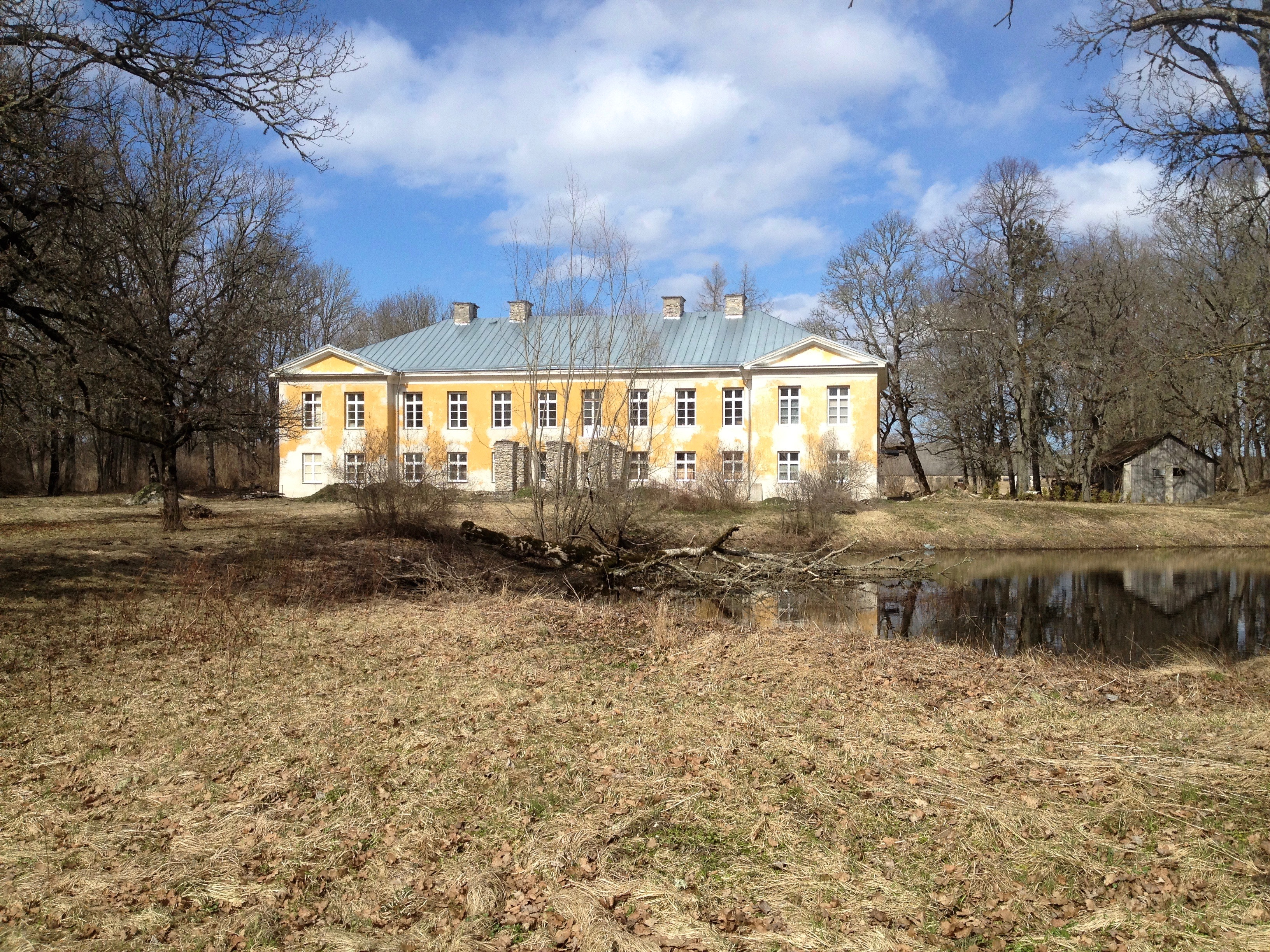 Vaimõisa mõisa peahoone